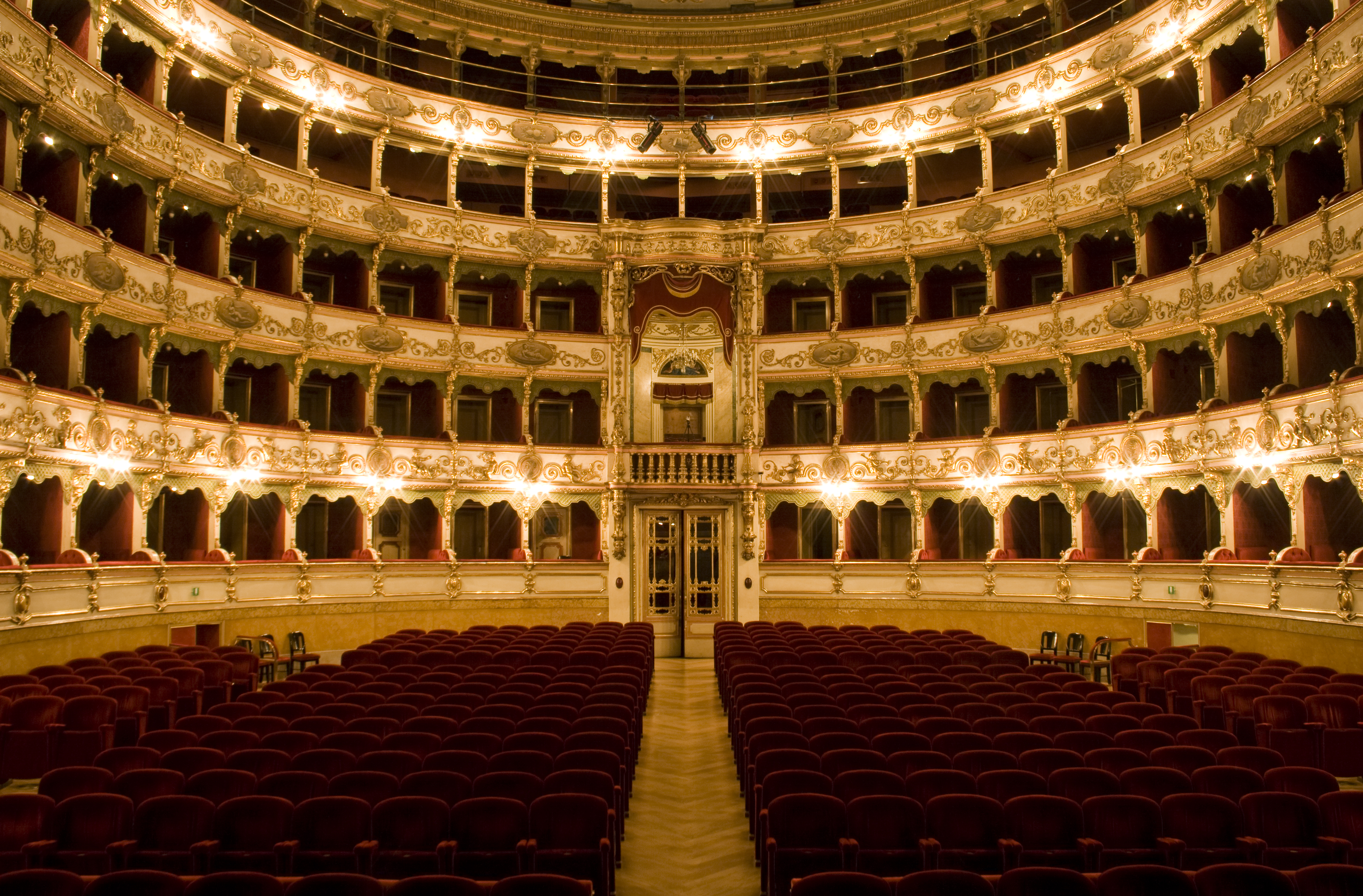 L'interno della sala del Teatro Grande di Brescia